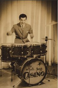 Tito Alberti. Orquesta Jazz Casino.